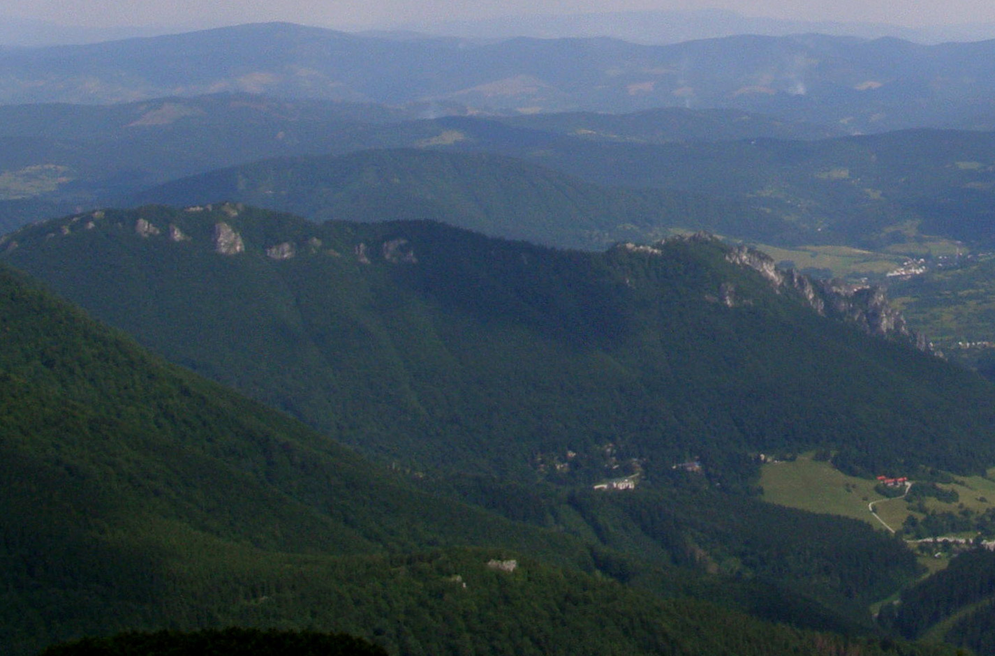 horský masív Sokolie